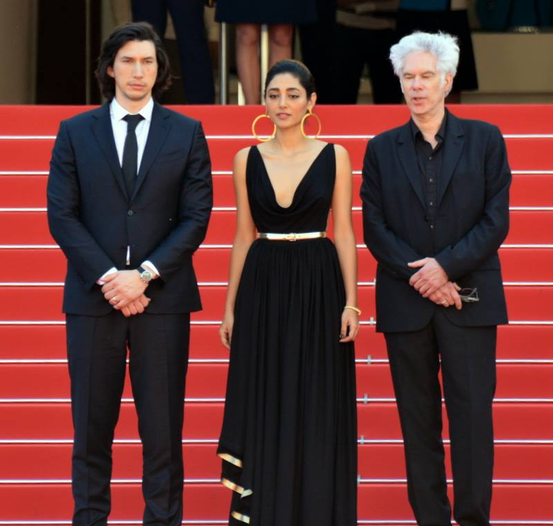 Présentation du film "Paterson" au festival de Cannes : Adam Driver, Golshifteh Farahani et Jim Jarmusch